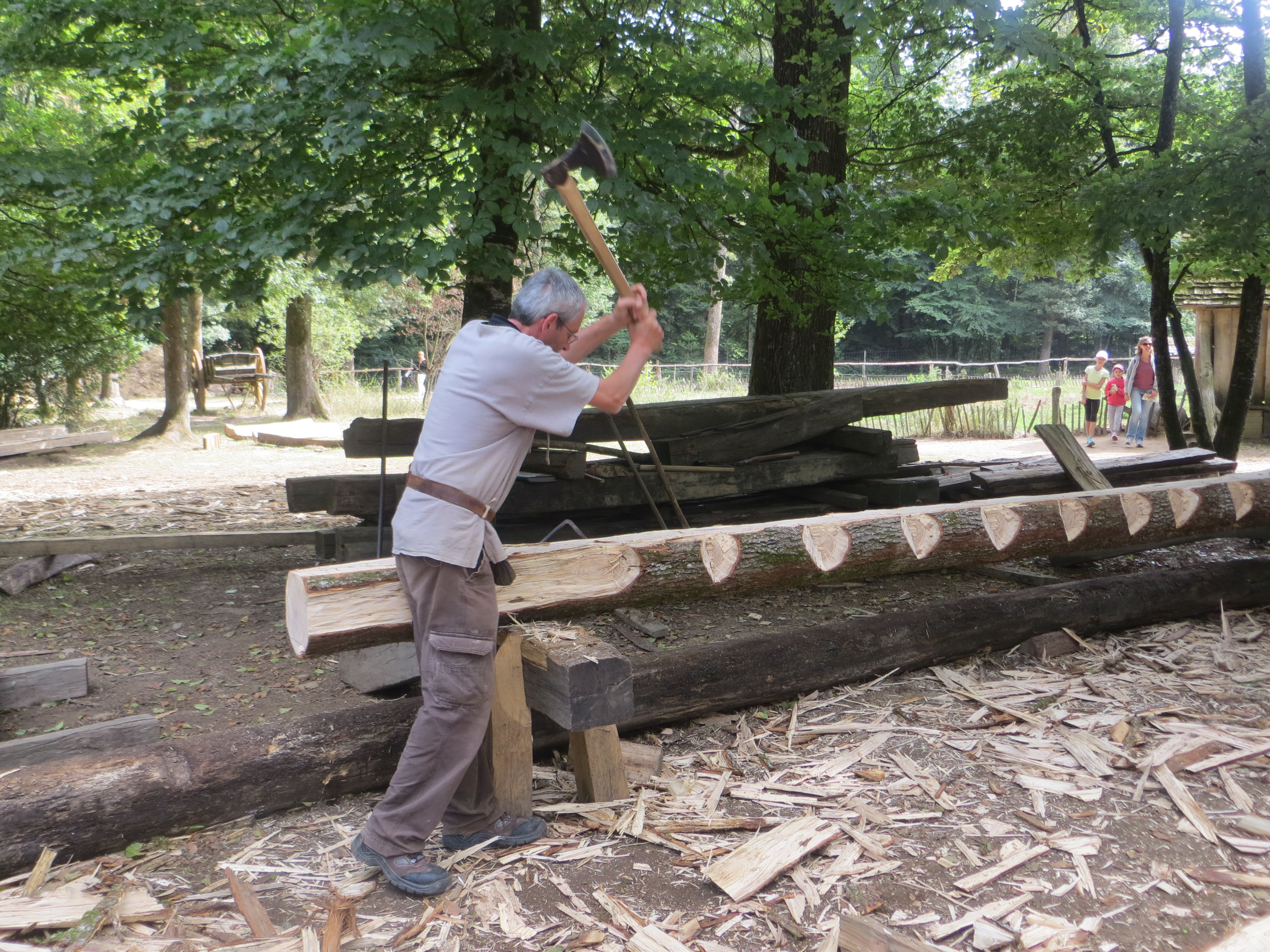 Le château de Guédelon, le 16 août 2015. Charpentier à l'ouvrage.